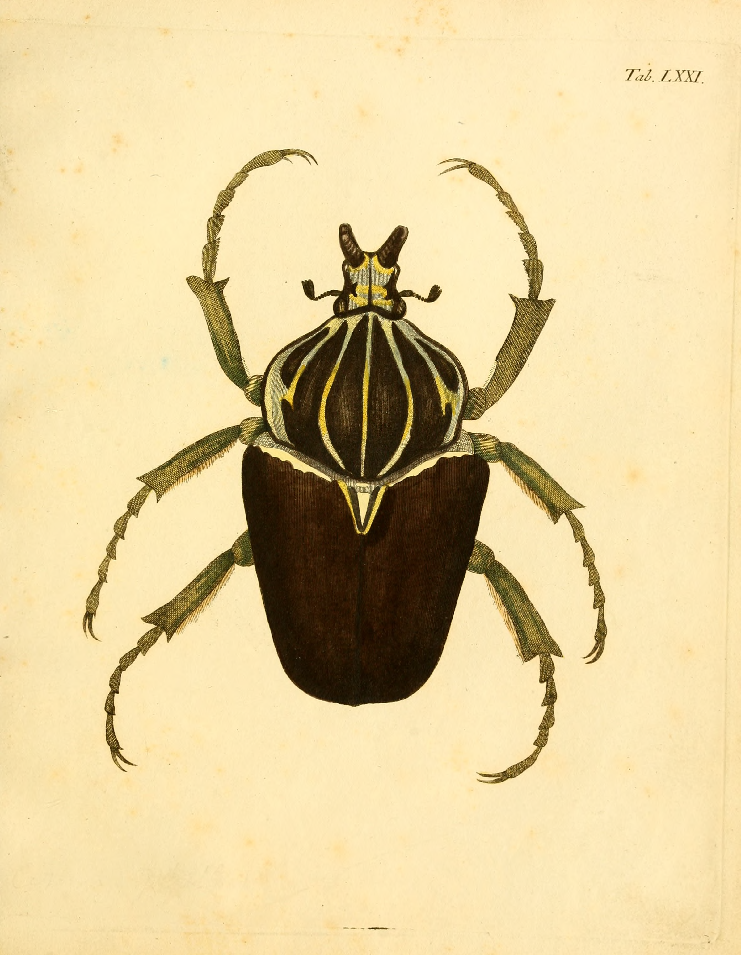 Hand-coloured plate from Abbildungen zu Karl Illiger's Uebersetzung von Olivier's Entomologie.